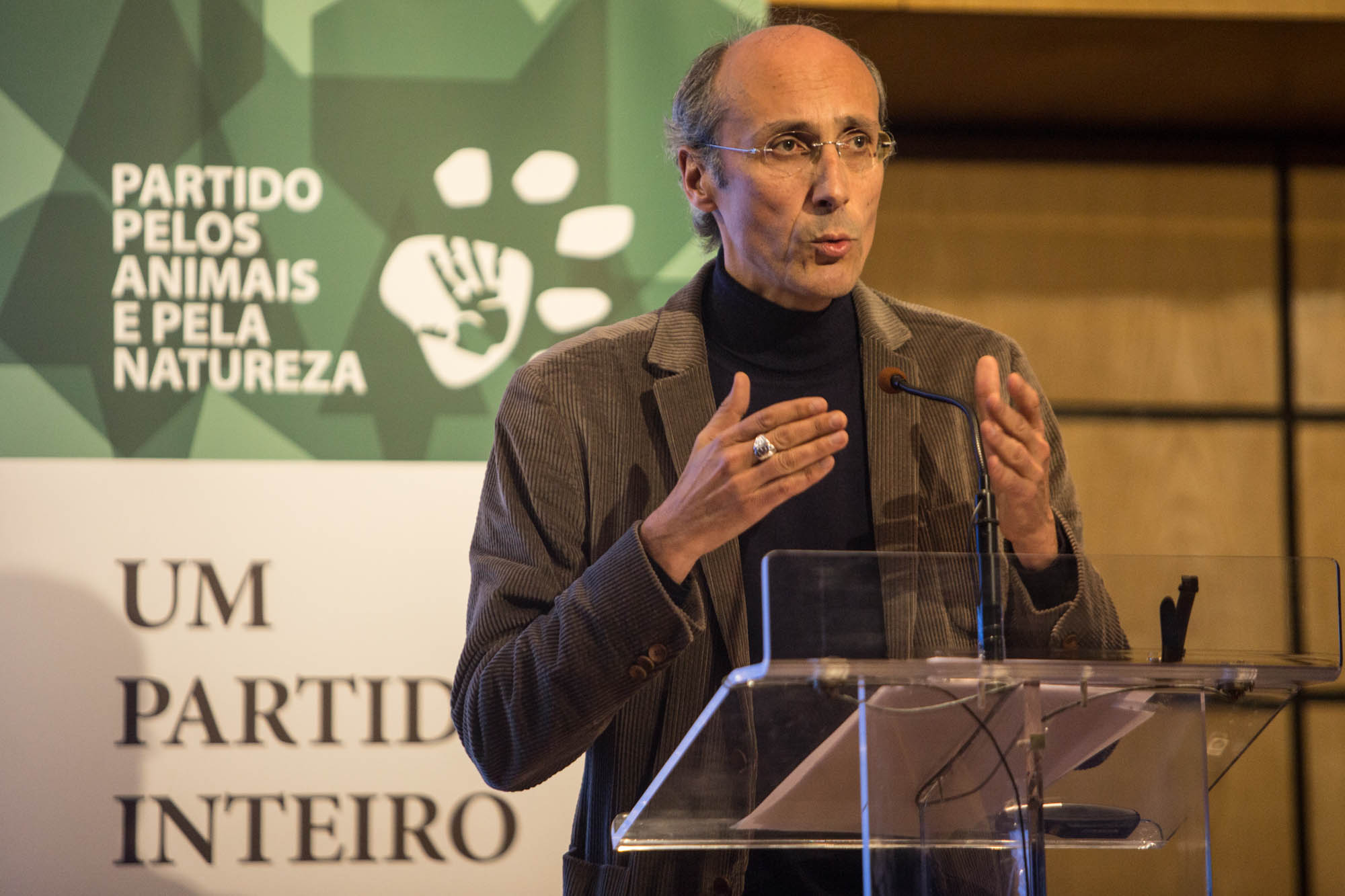 Encuentro entre los partidos animalistas portugués (PAN), holandés (PvdD) y español (PACMA) celebrado en Lisboa el 8 de enero de 2014, con la asistencia de Paulo Borges, Marianne Thieme y Silvia Barquero respectivamente.